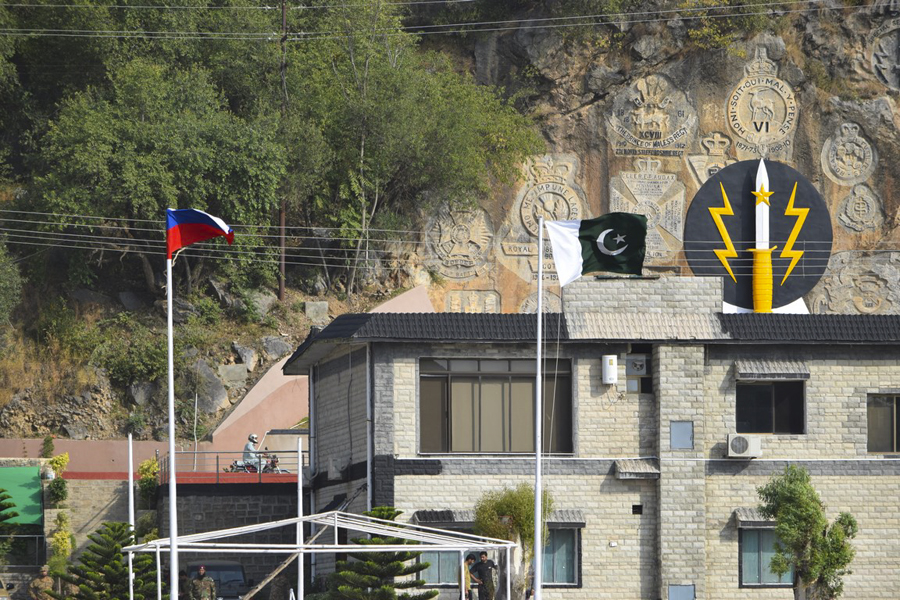 Тренировка по десантированию из вертолетов военнослужащих России и Пакистана на учении «Дружба-2016»